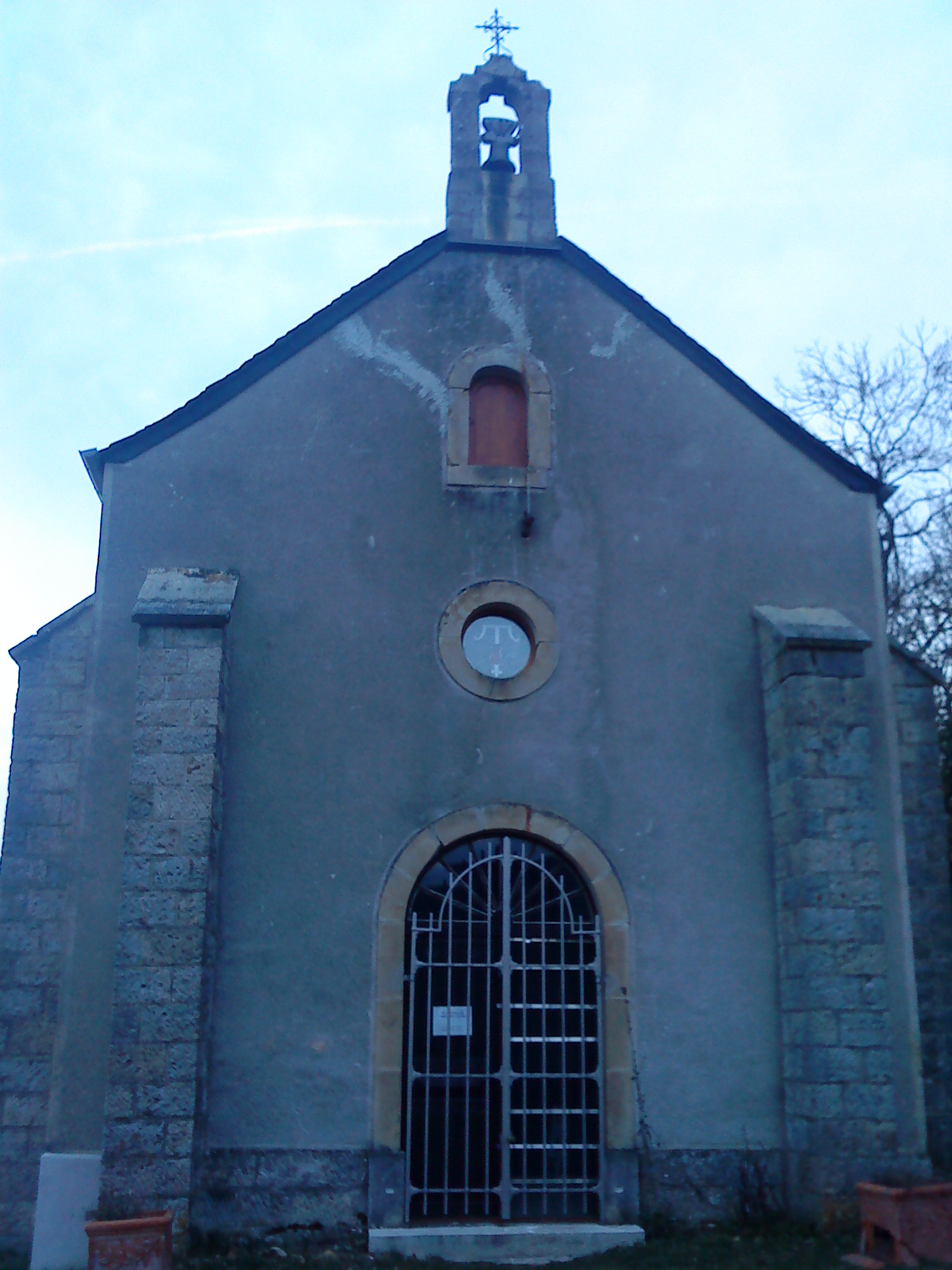 chapelle Sainte-Thècle, à proximité du villages des Bories, commune de Saint-Bonnet-de-Chirac (Lozère, France)